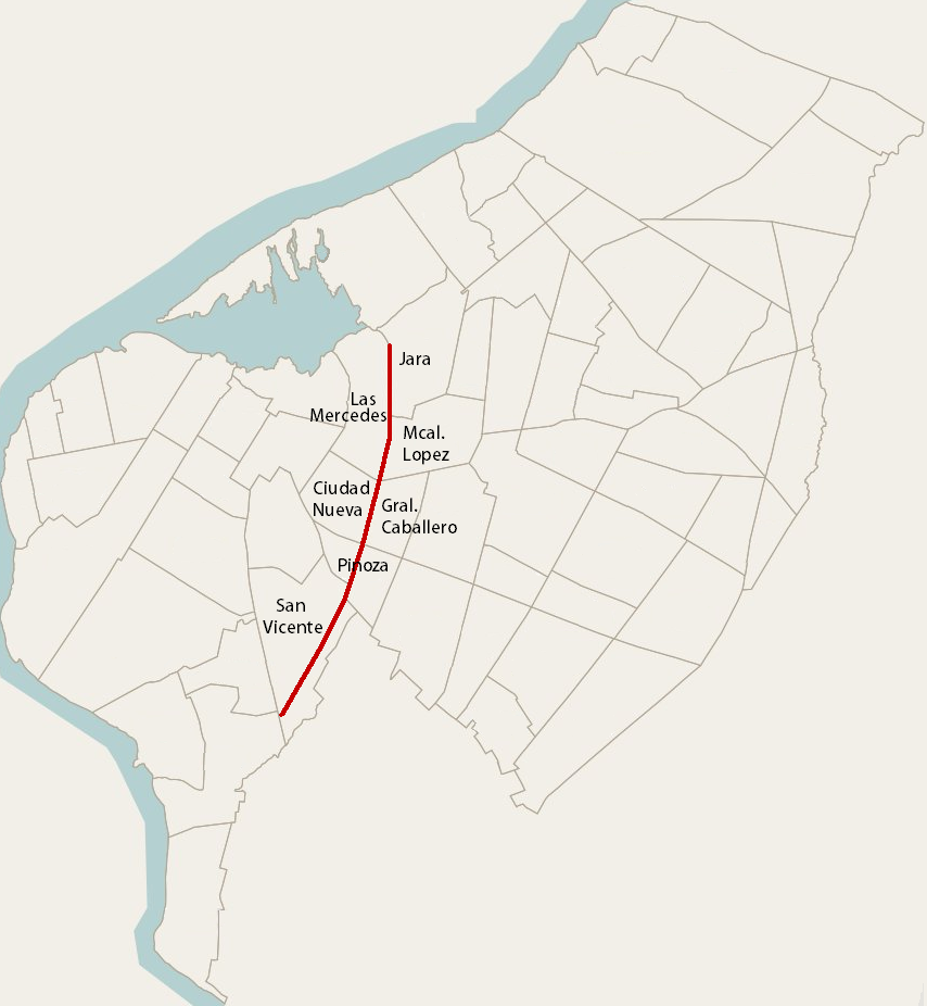 General Santos Avenue in Asunción, Paraguay